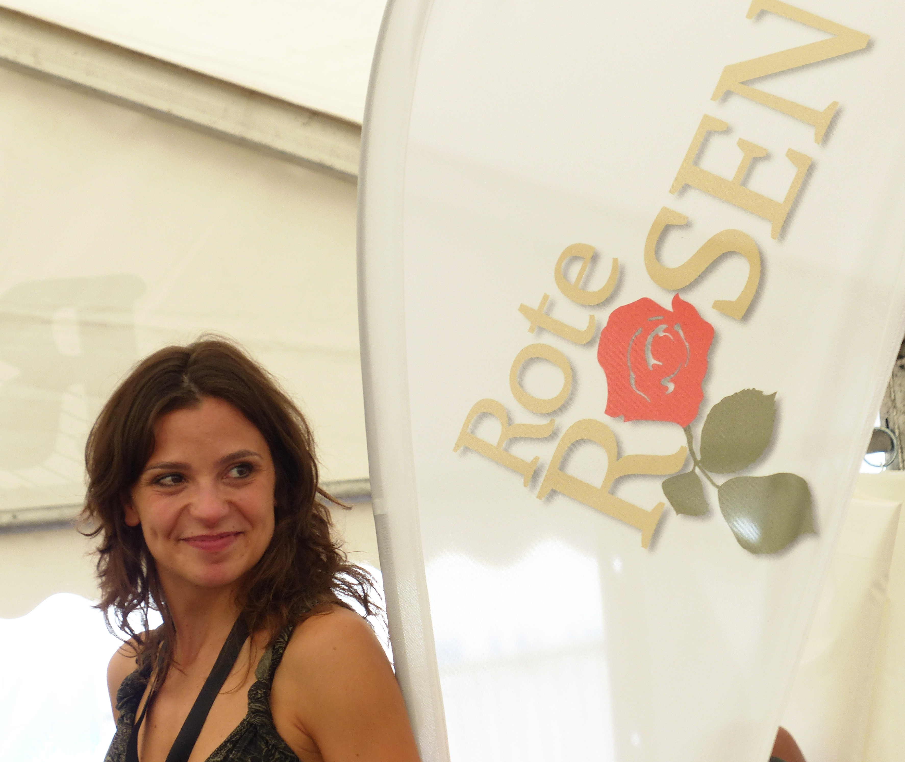 Anika Lehmann (Rieke Friedrichs) beim Rote Rosen-Fantag 2013, 28.07.2013, Lüneburg